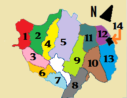 División Política de Facatativá